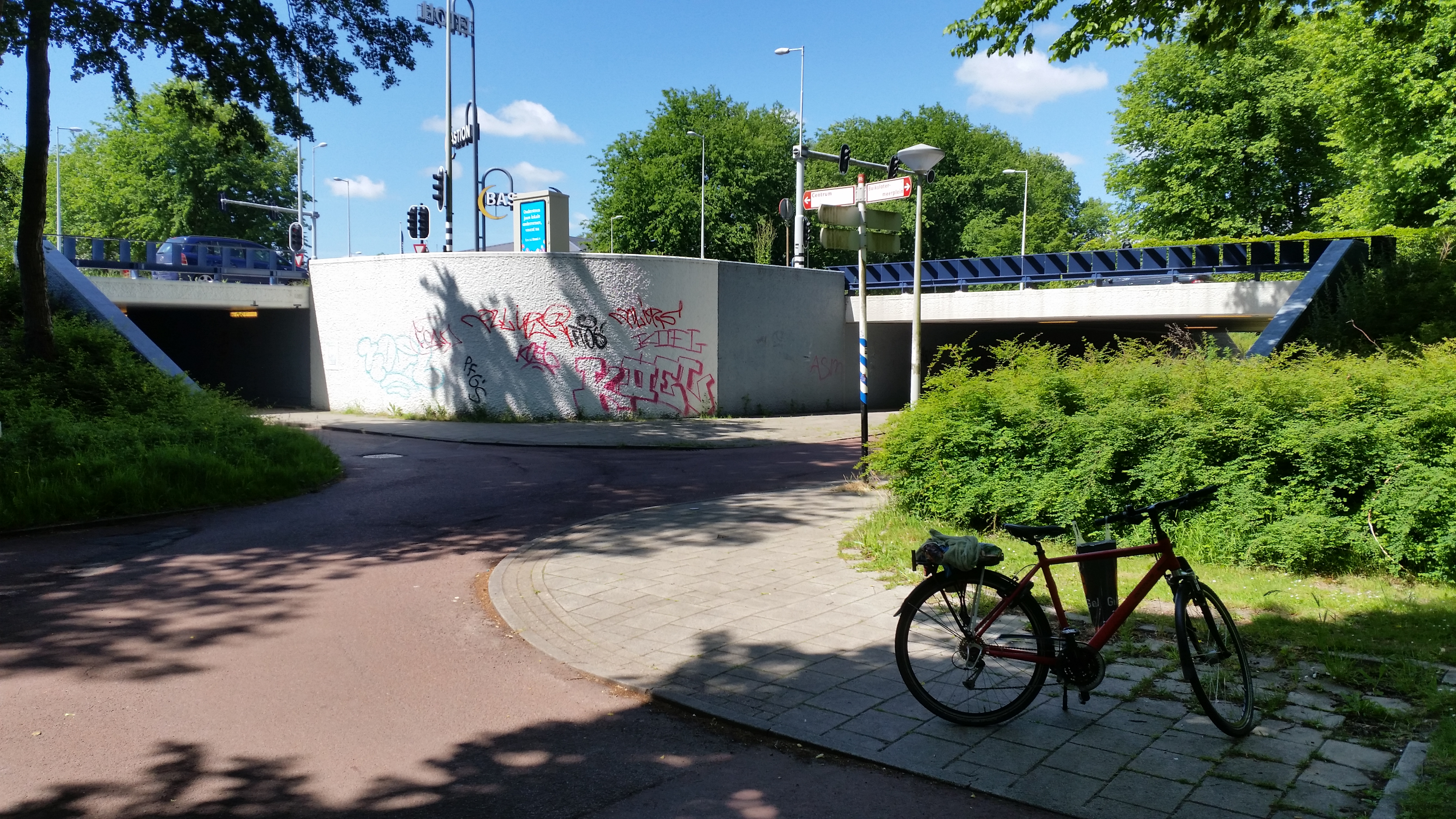 Impressie van Brug 939 in de Waddenweg en Nieuwe Purmerweg, Amsterdam-Noord (mei 2020)